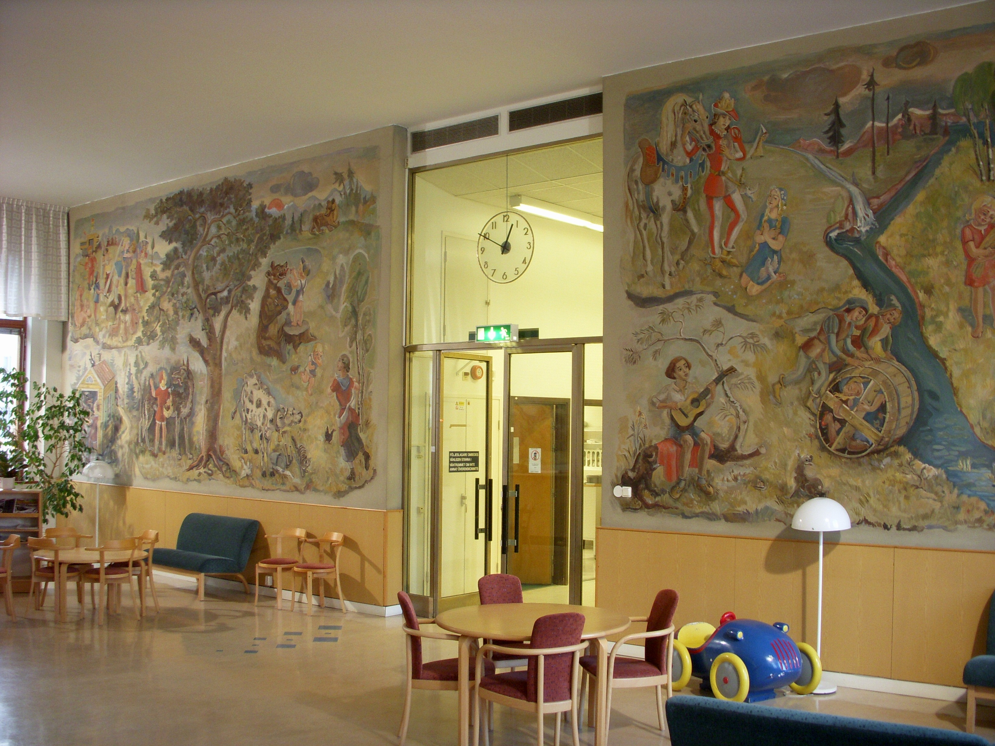 Eastmaninstitutet i Sockholm, väntrum väggmålningar av Einar Forseth